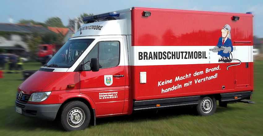 Brandschutzmobil des Kreisfeuerwehrverband Ostprignitz-Ruppin